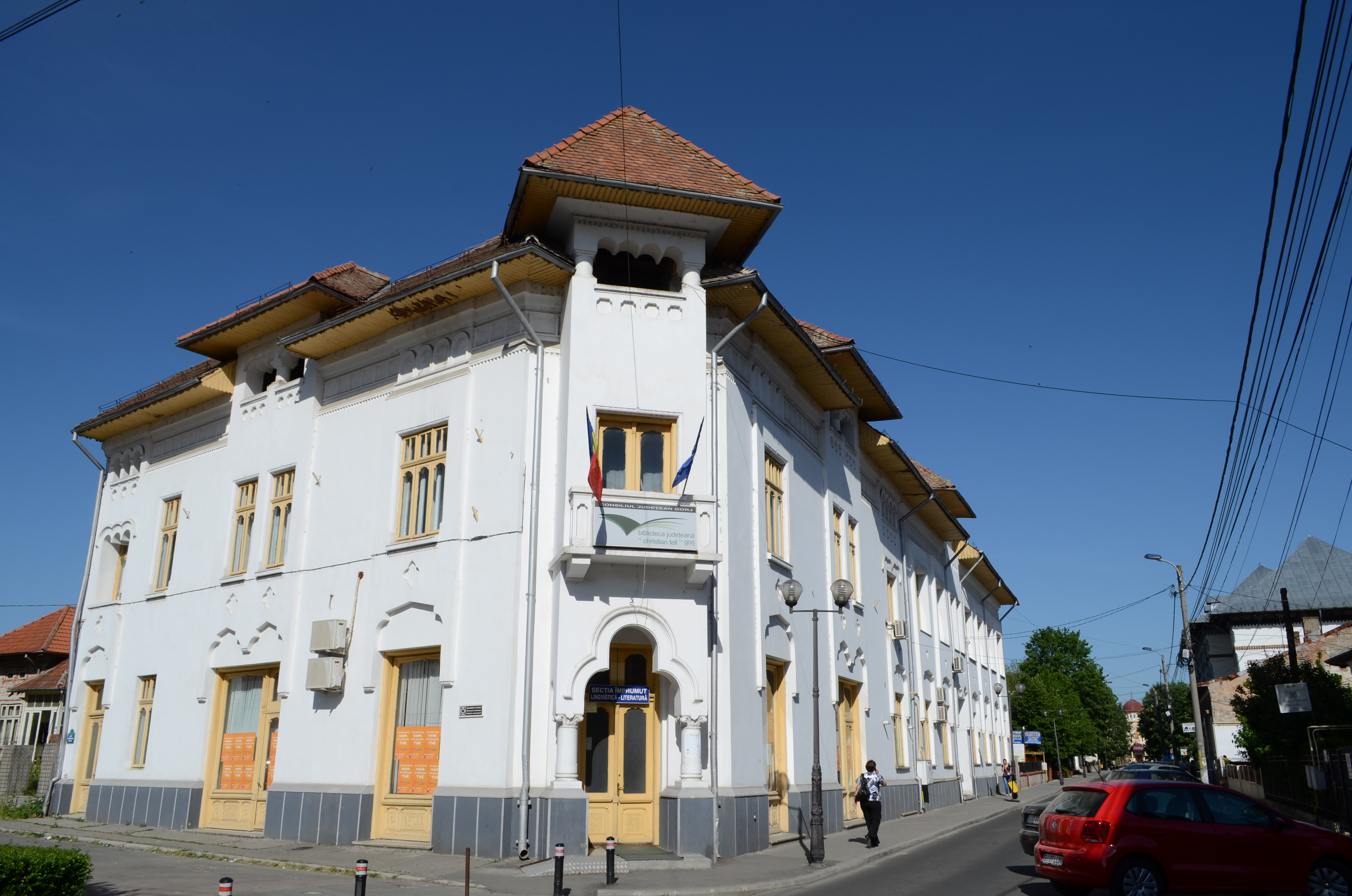 Biblioteca Județeană "Christian Tell" Gorj, Calea Eroilor nr. 23, Târgu Jiu